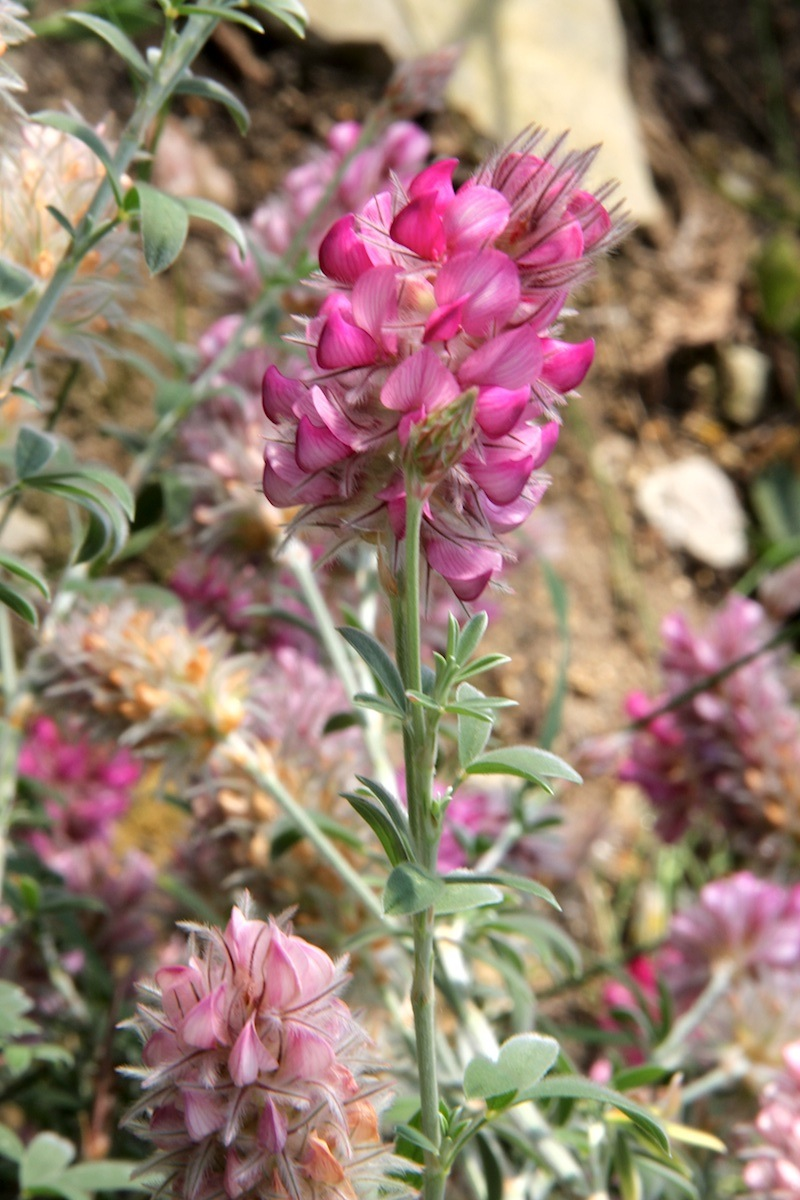 Ebenus cretica